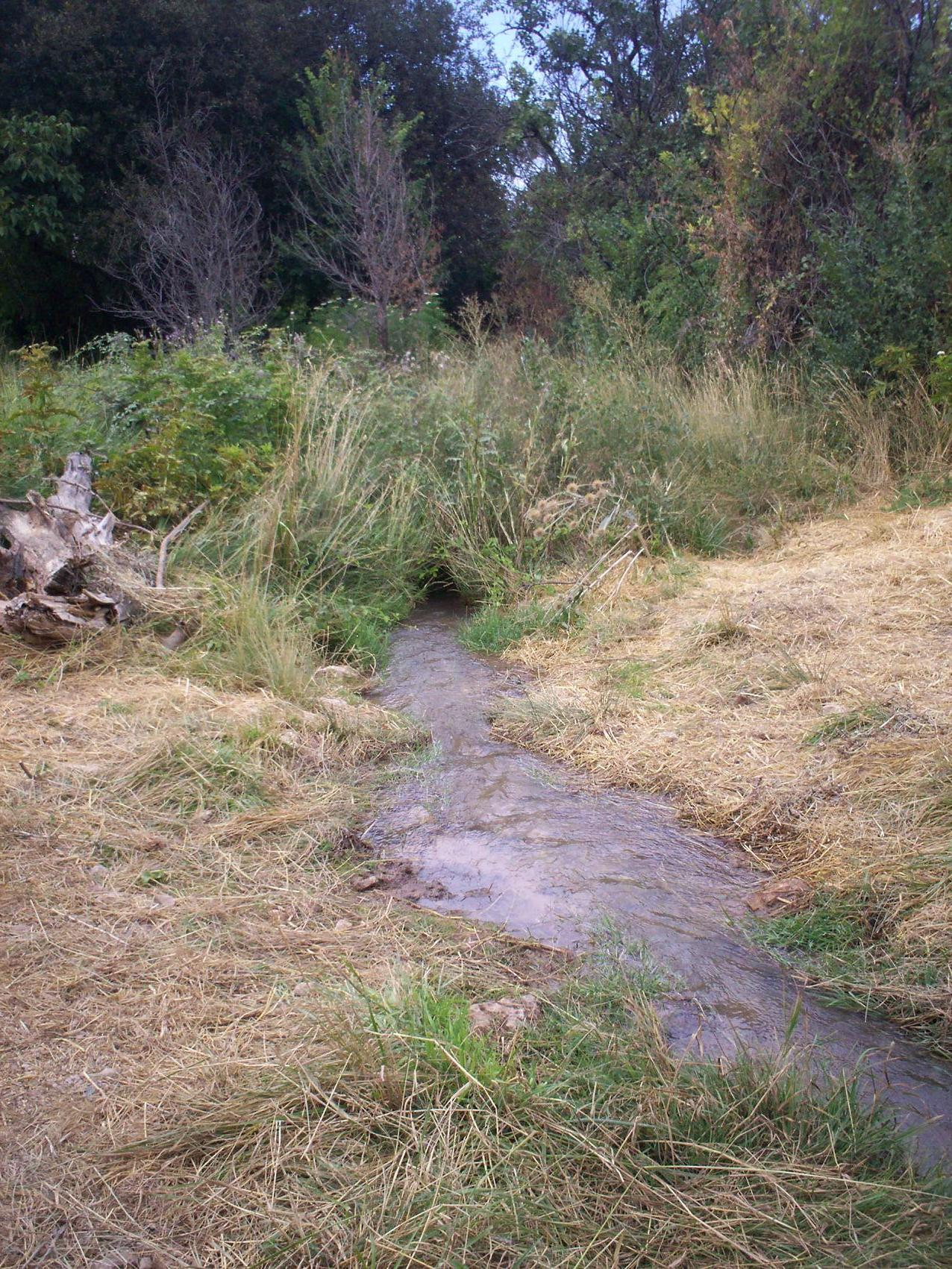 Imagen del rio Ortiz antes de entrar en Abanto